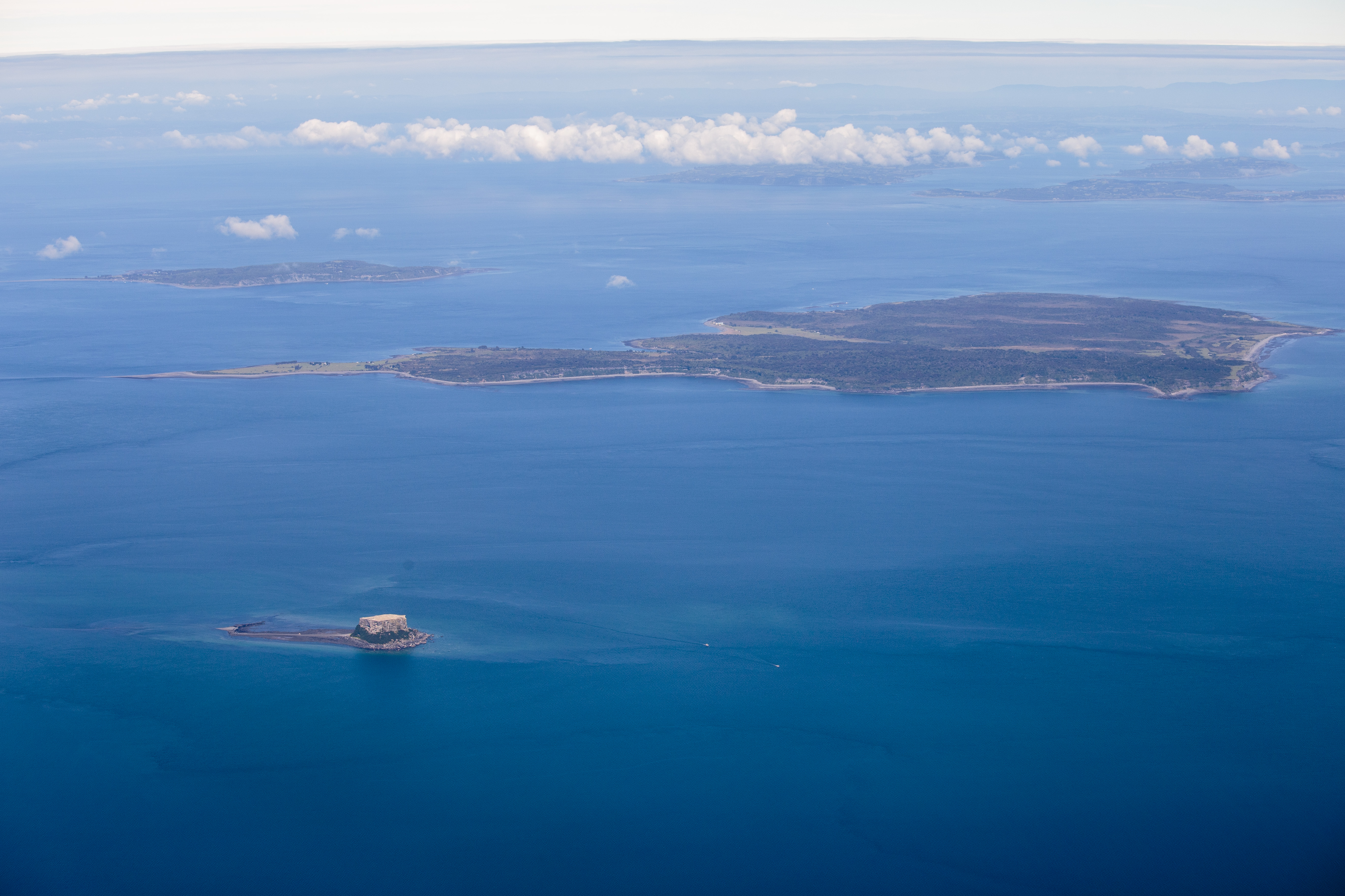 En primer plano el islote Nihuel; después isla Chulín, isla Chuit (izq) e isla Apiao (der).